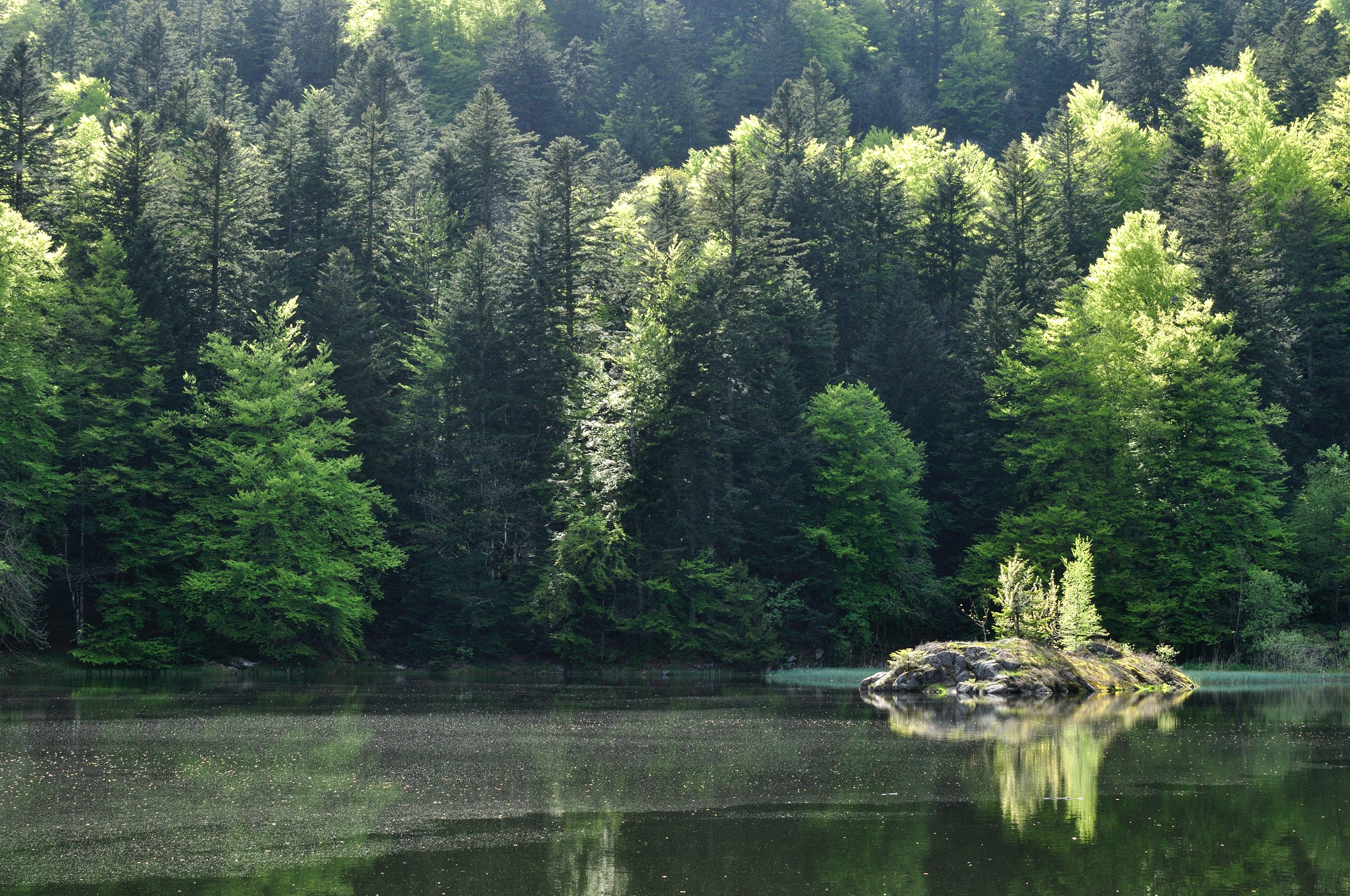 Étang des Roseaux, massif des Vosges, au printemps